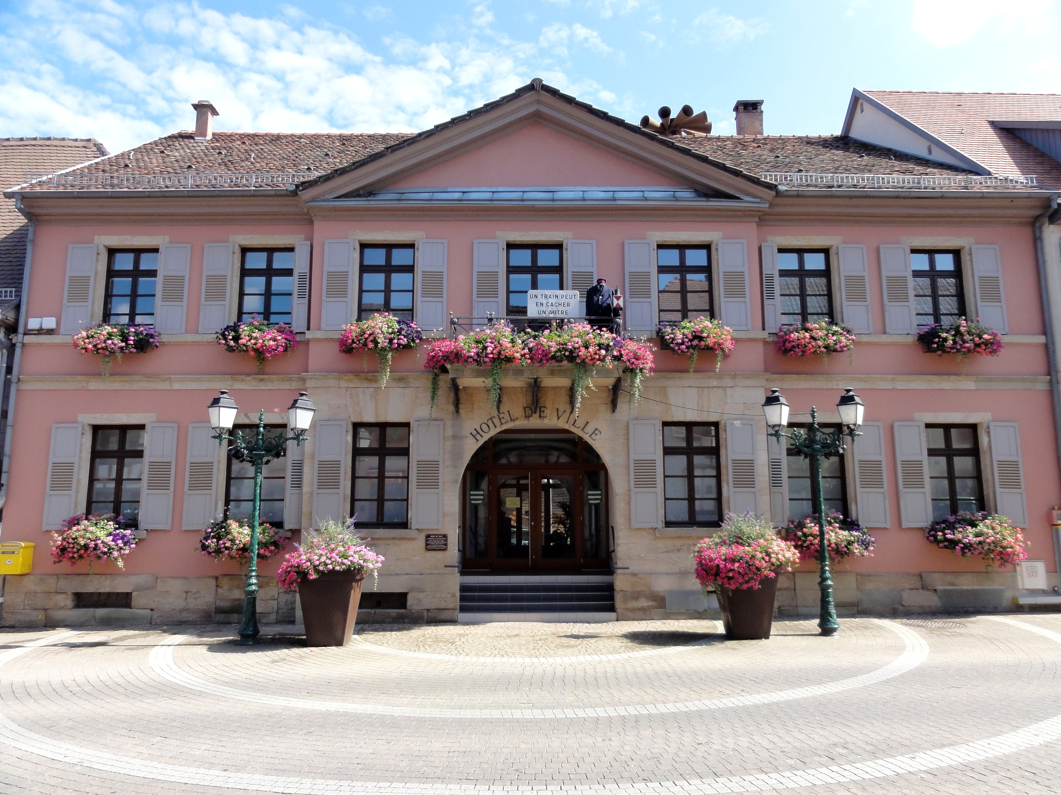 Alsace, Bas-Rhin, Soultz-sous-Forêts, Hôtel de ville (XIXe-XXe), 2 rue des Barons-de-Fleckenstein.